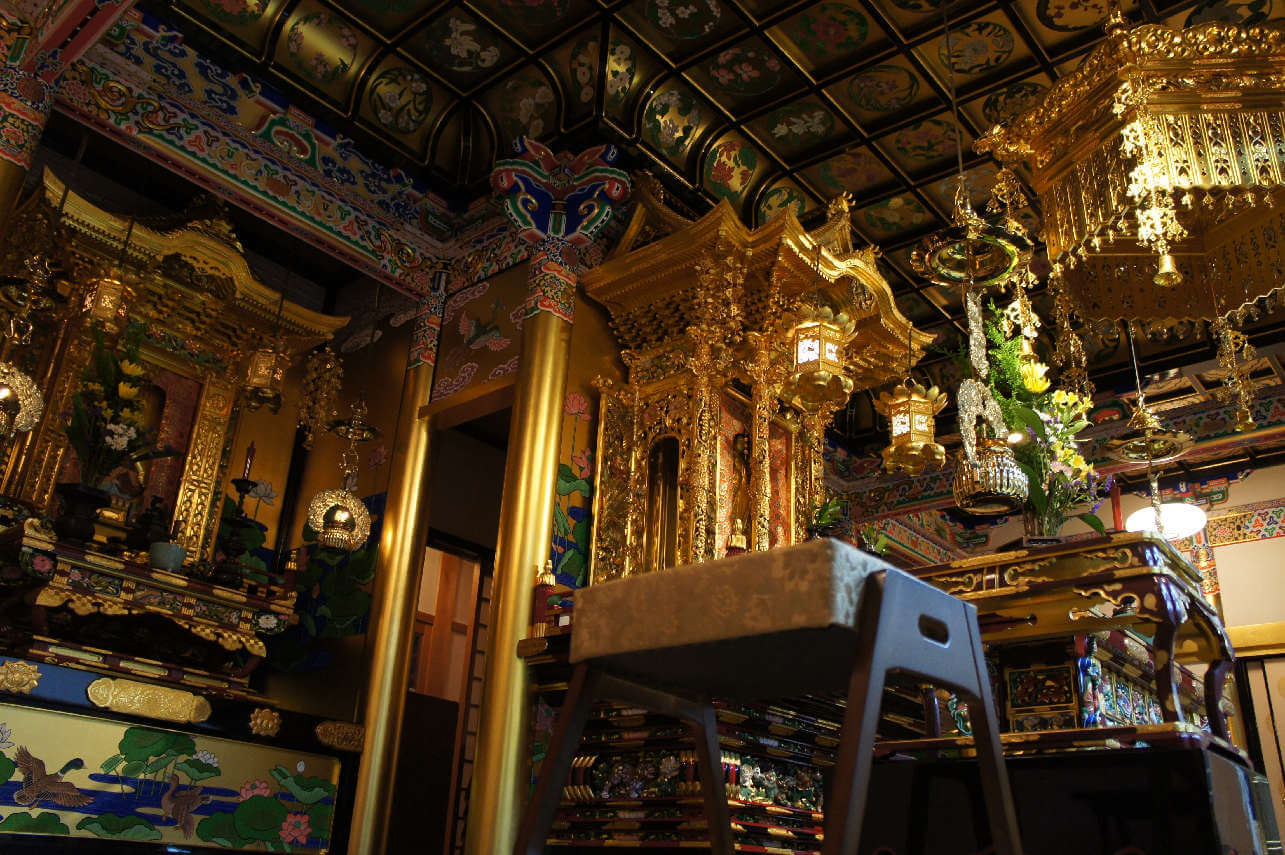 阿弥陀如来と折上格天井